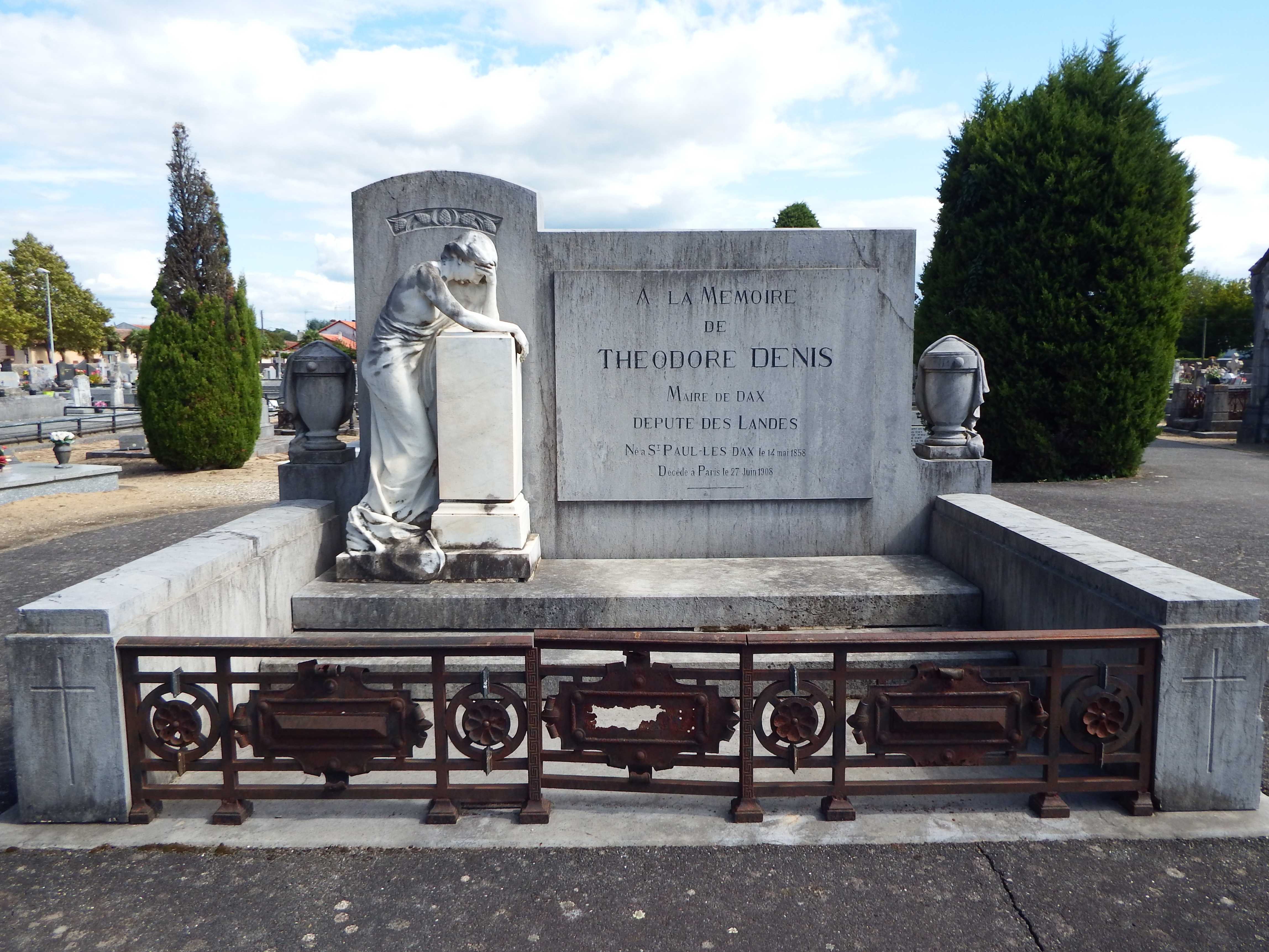 Monument funéraire en l'honneur de Théodore Denis, au cimetière Saint-Pierre de Dax.